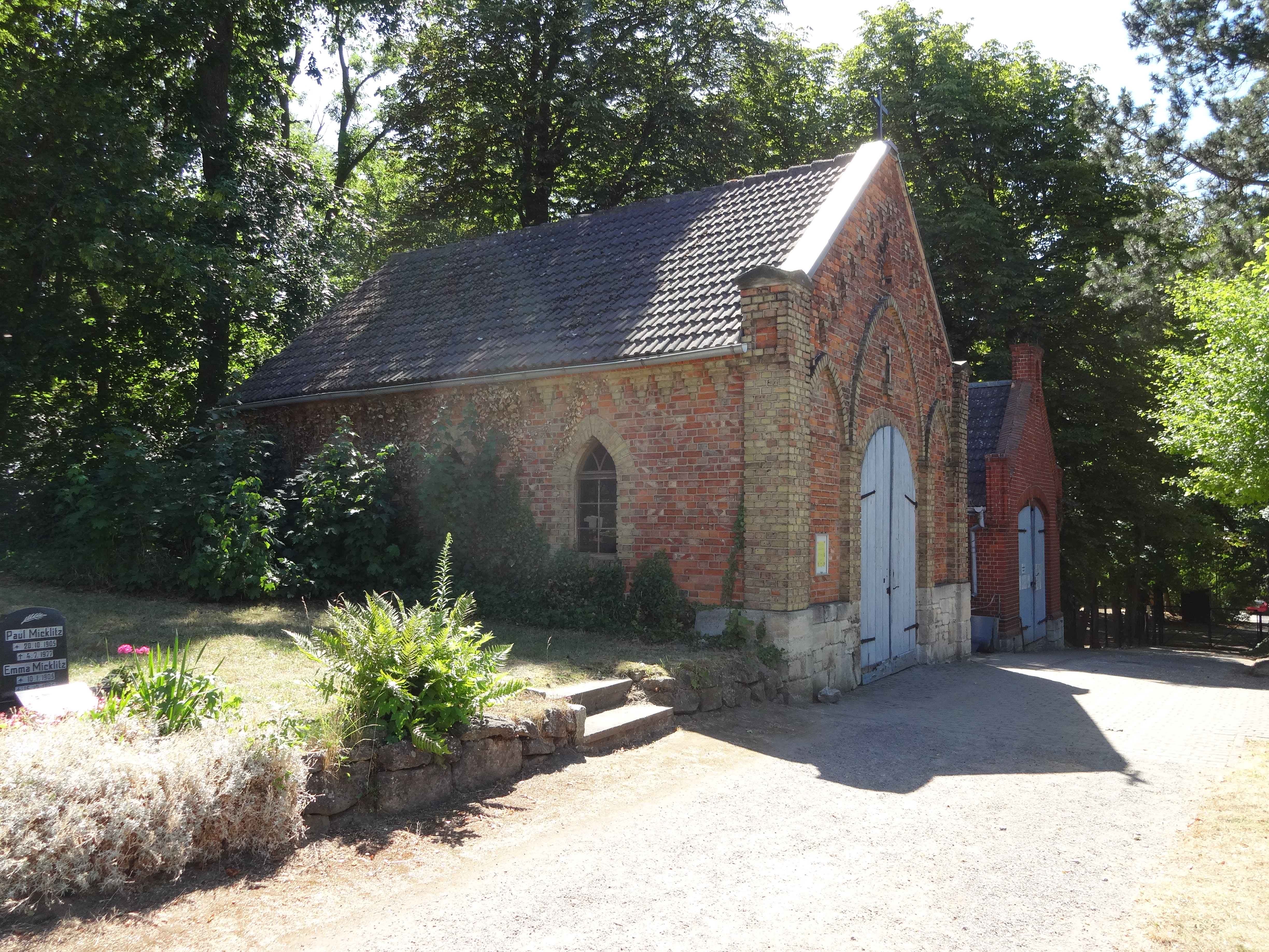 denkmalgeschützte Friedhofskapelle auf dem Rendelsberg in Dedeleben